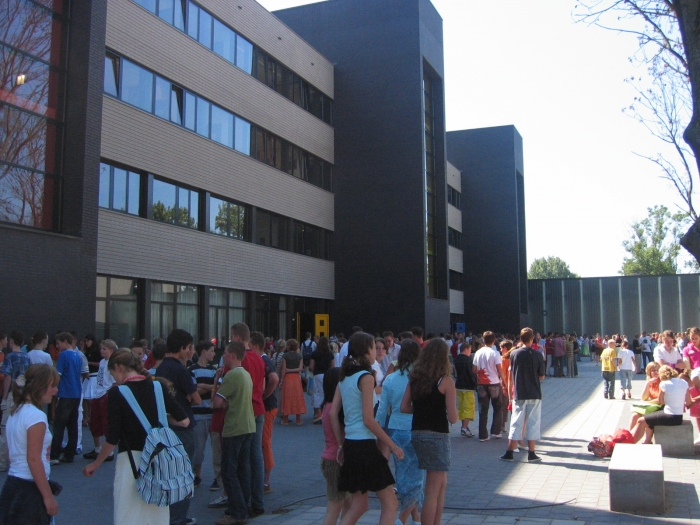 the Guido de Bres school in Rotterdam